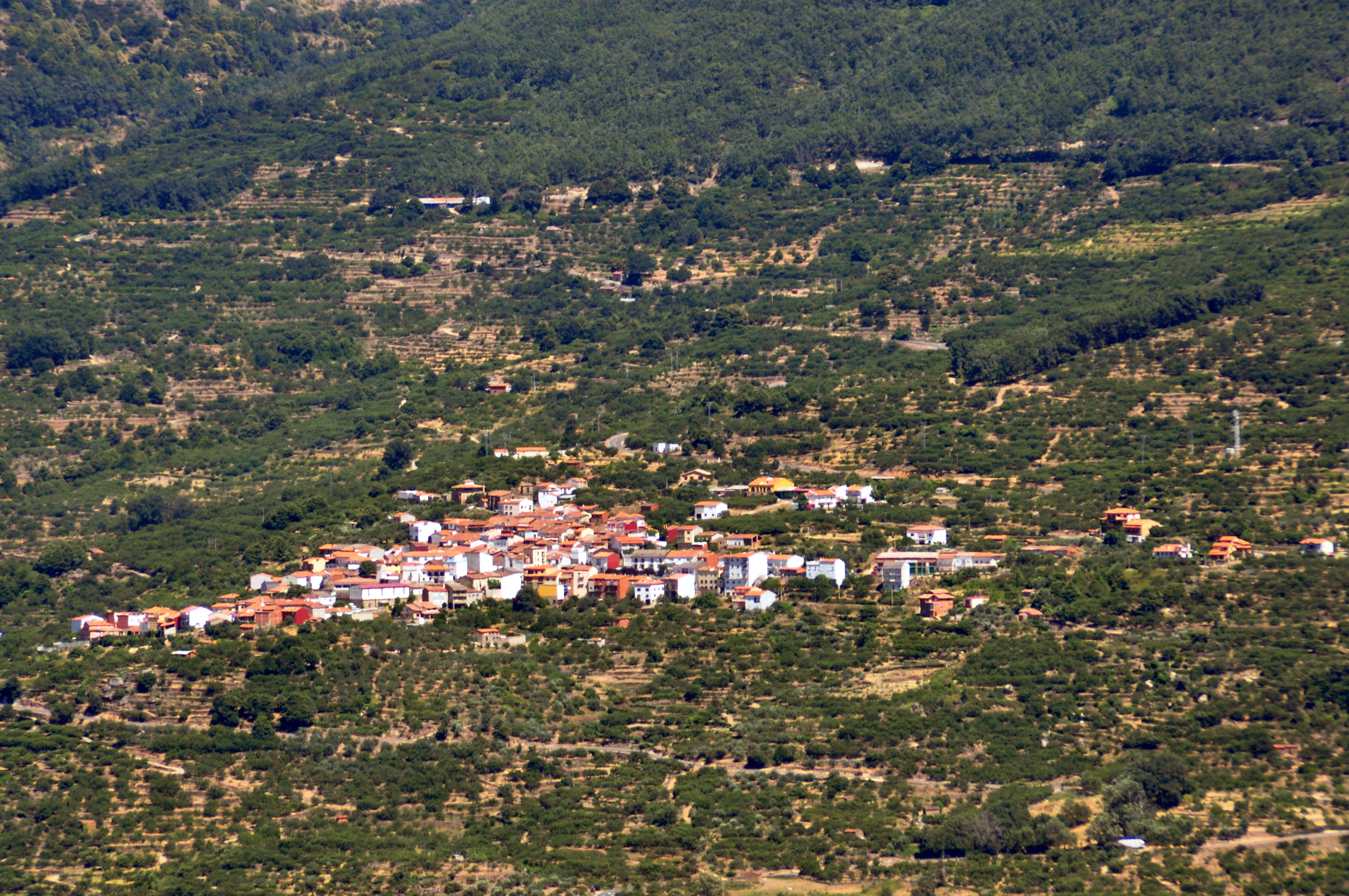 Vista de la población de Valdastillas, en el Valle del Jerte (provincia de Cáceres, España), desde la población vecina de El Torno.